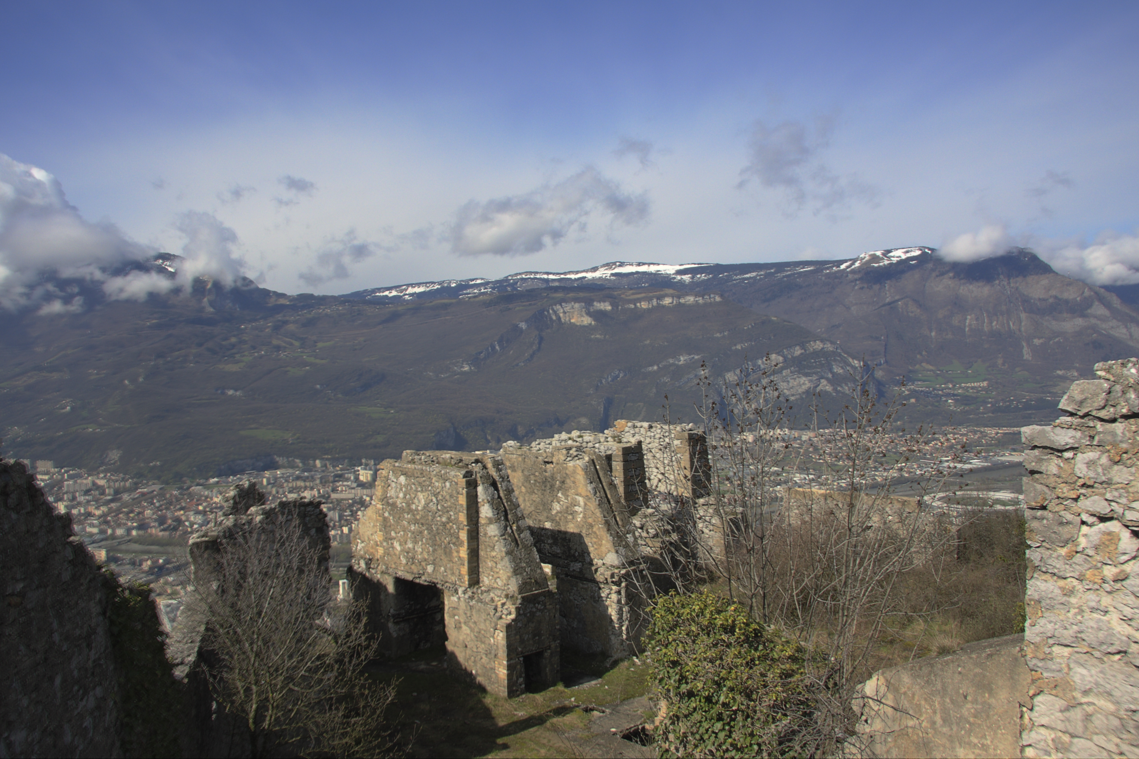 Vestiges du puits 630 qui était utilisé pour transporter le calcaire utilisé pour faire le ciment prompt par les cimenteries de la porte de France à Grenoble.